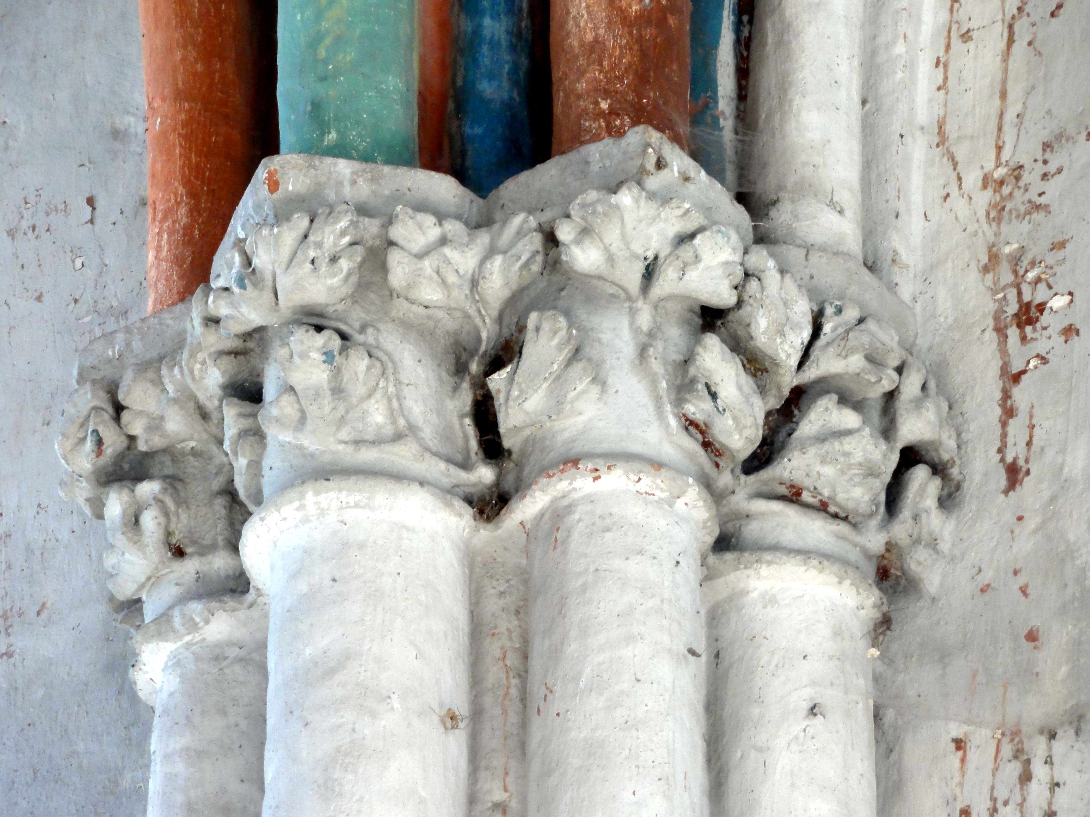 Chapiteau(x) - voir titre.